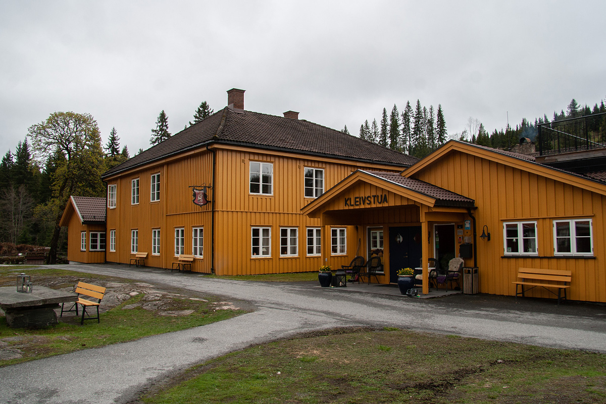 Kleivstua hotell på Krokskogen.